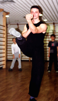 סגנון יונג צ'ואן (ווינג צ'ון)